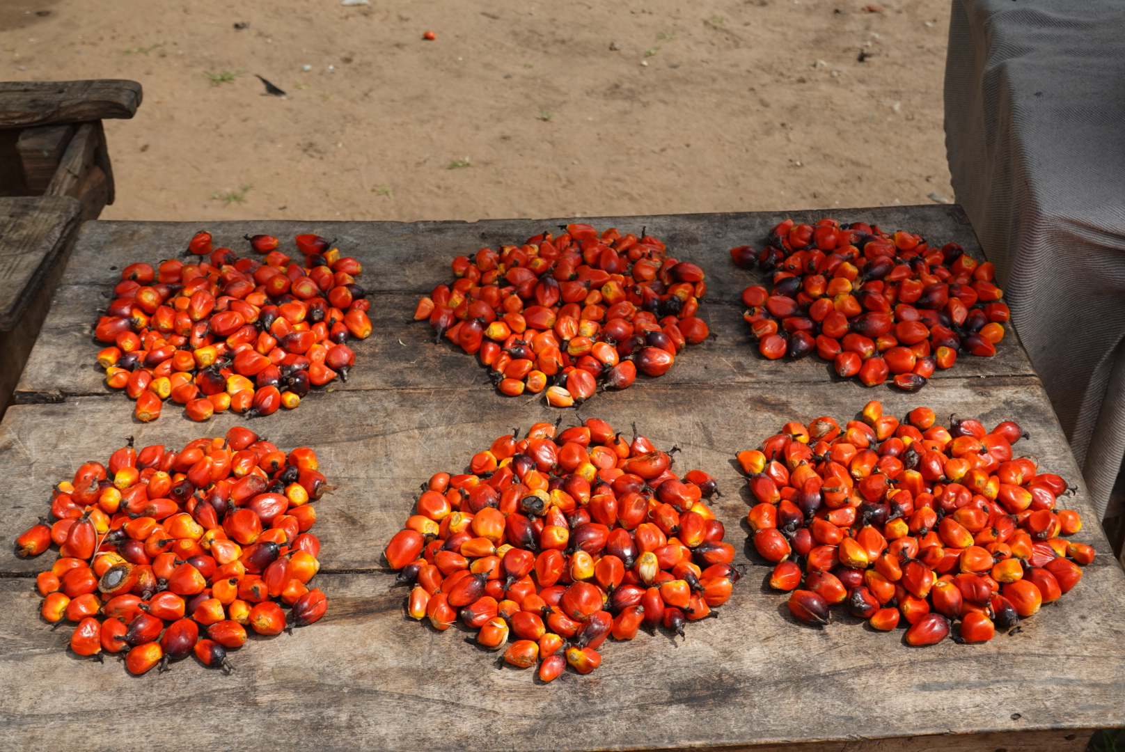 palmuytimiä aseteltuna kauppiaan päydälle